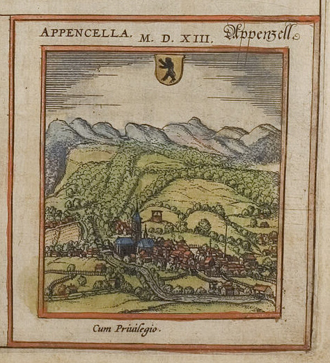 Appenzell, vom Blatt der Dreizehn Alten Orte der Schweiz